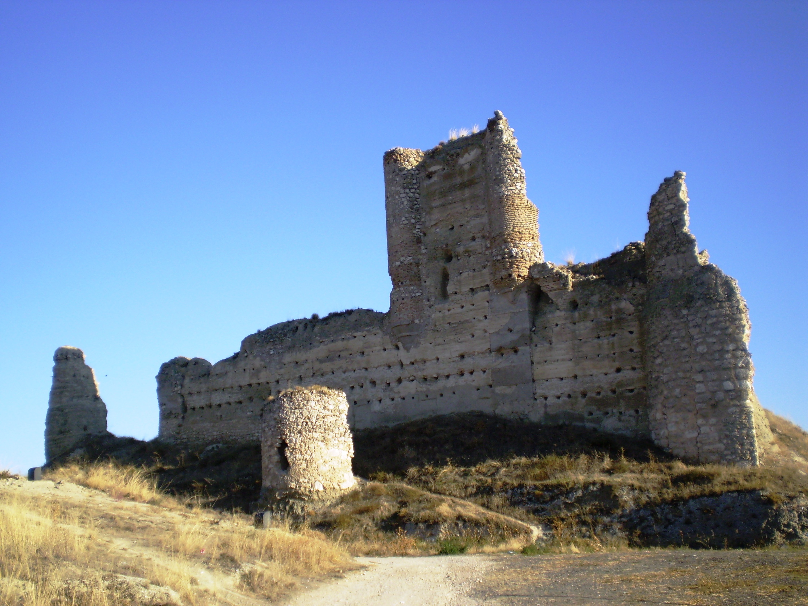 Fuentidueña de Tajo Castle, Community of Madrid, Spain